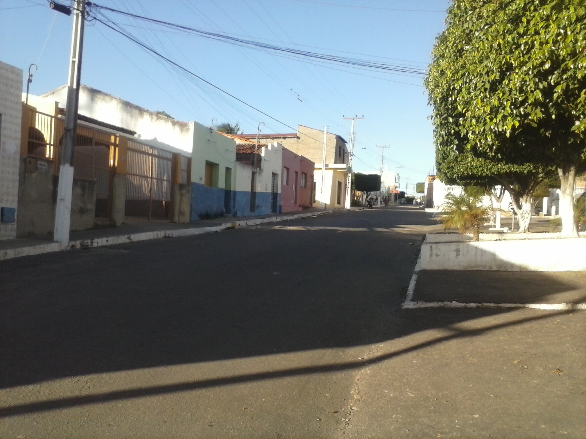 Altaneira